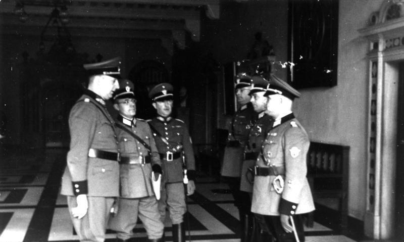 Im Rathaus 23.4.1937